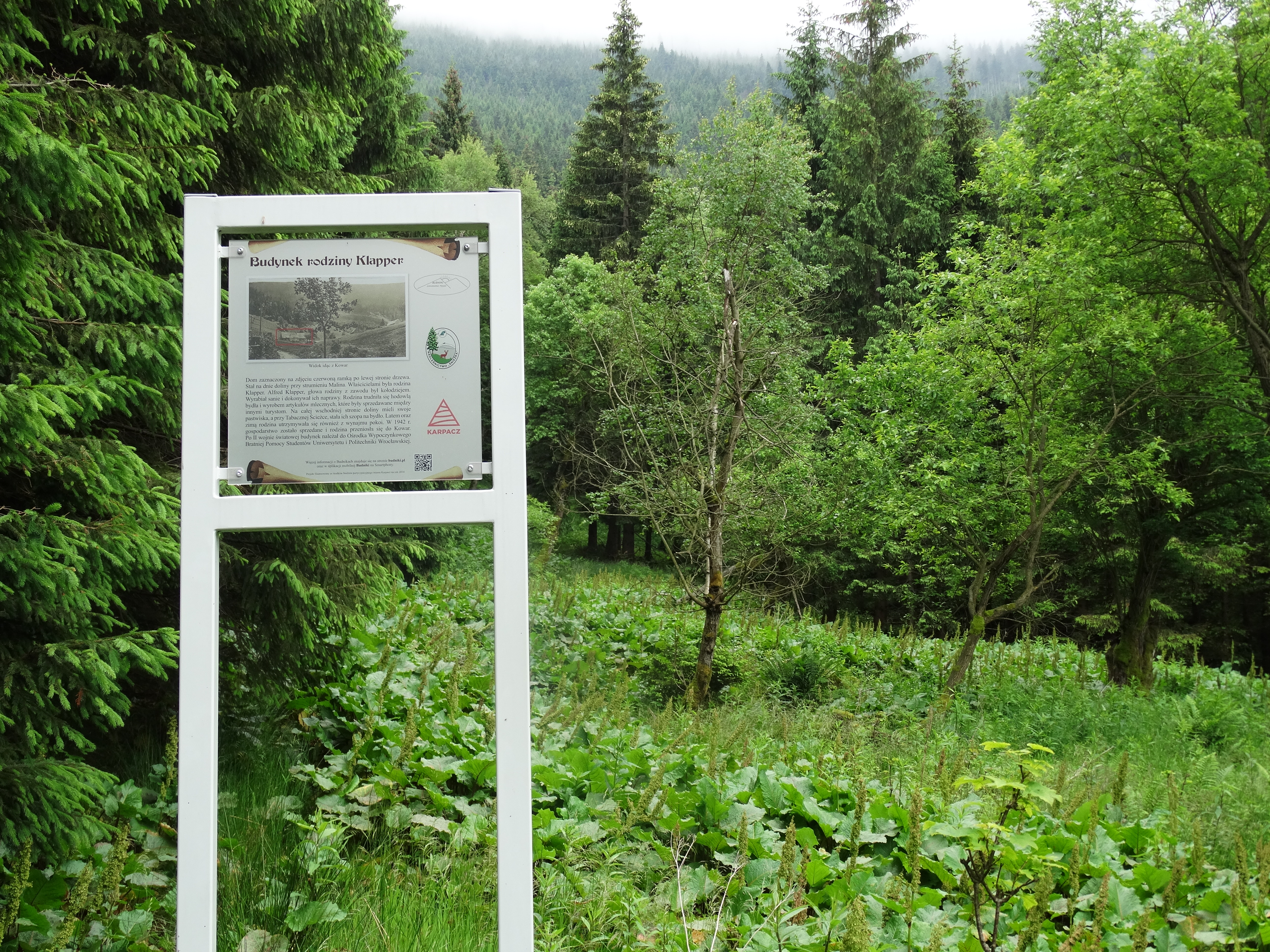 Tablica